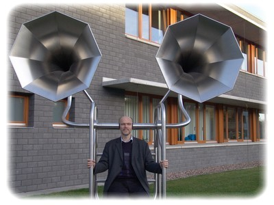 Birer Kollmeier auf dem Hörthron im Hörgarten